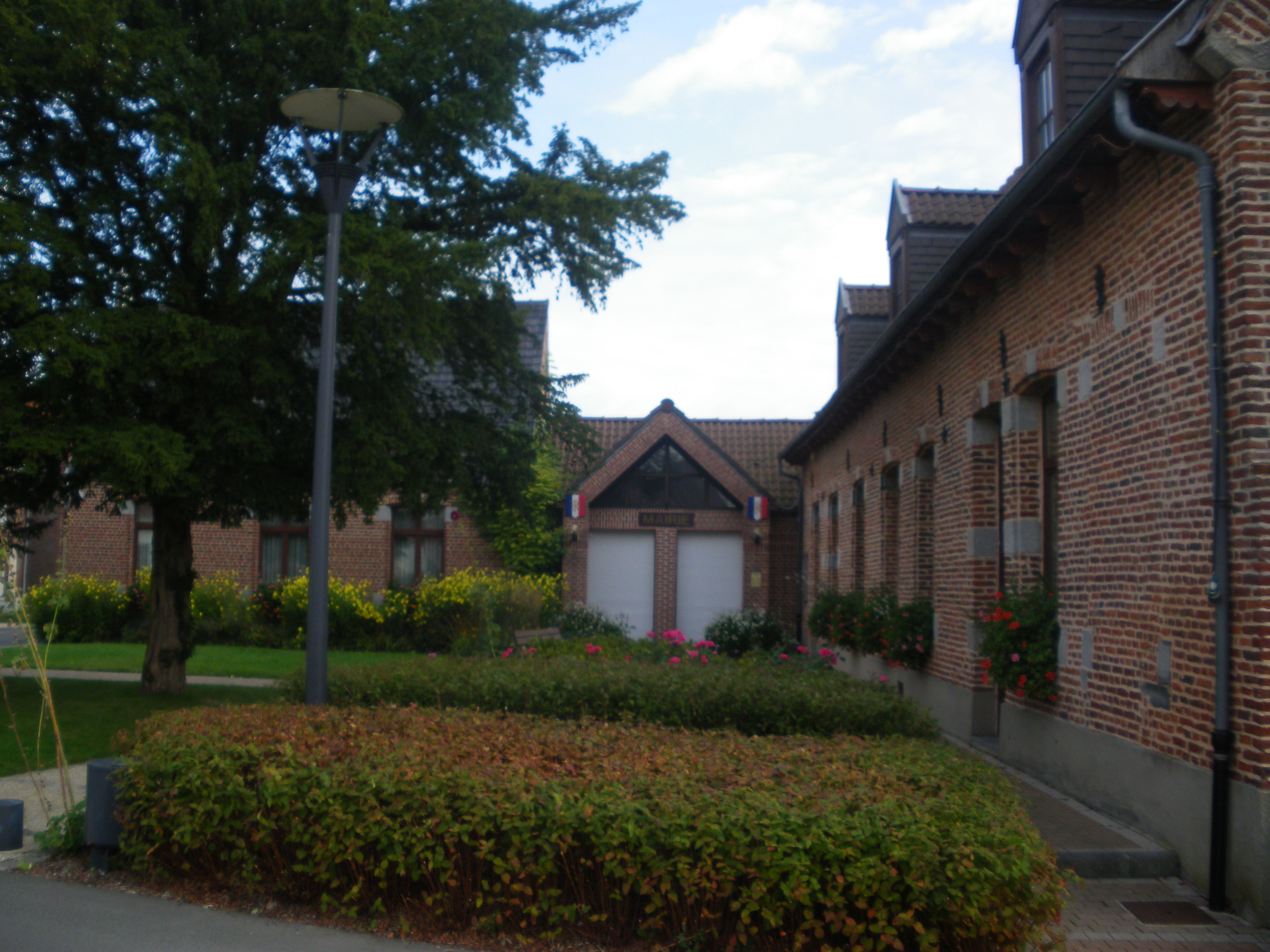 Vue de la mairie de Bourghelles.